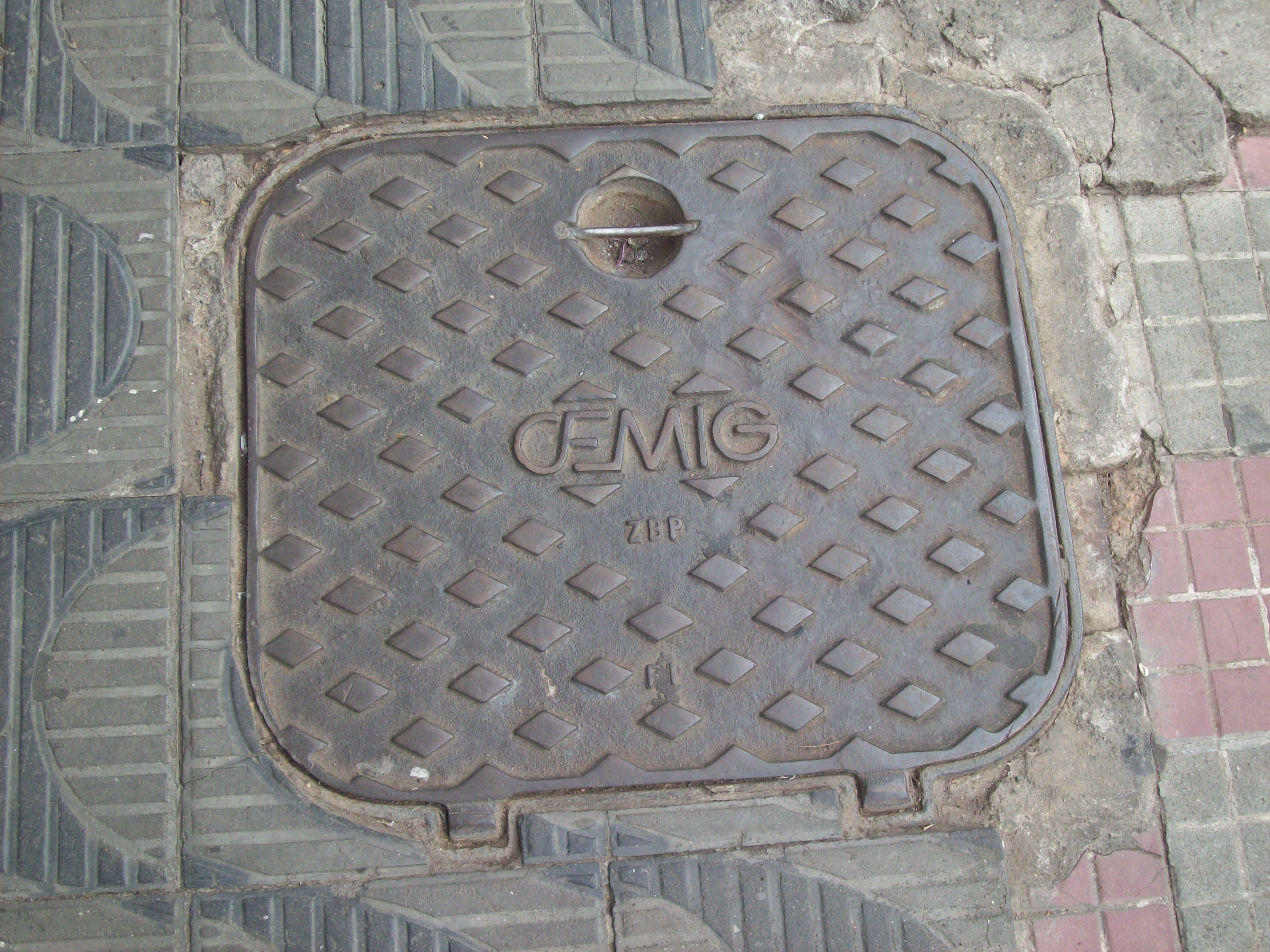 Poço de visita (bueiro) em Machado (MG)